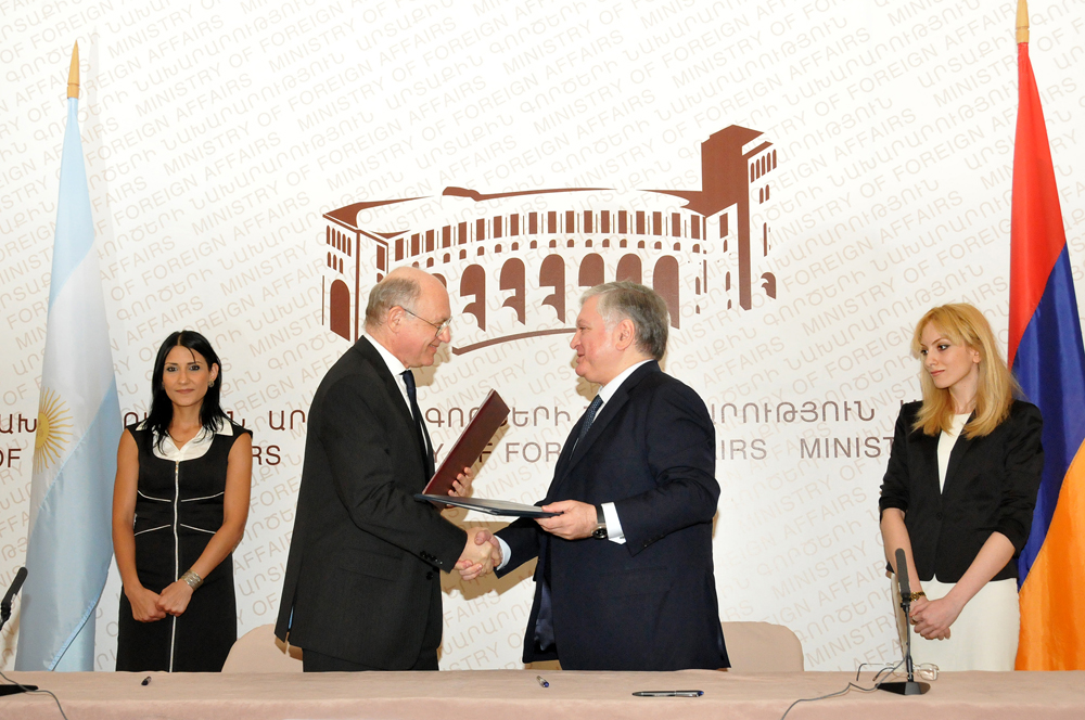 Armenia, Erevan, 4/09/12. El Canciller Timerman fue recibido por el presidente de la República de Armenia Serzh Sargsyan. También se entrevistó con el Canciller, Edward Nalbandian, el Primer Ministro Tigran Sargsyan y el Presidente de la Asamblea Naciobnal, Hovik Abrahamyan. Asmismo, visitó el Museo del Genocidio Armenio, donde deposito una ofrenda floral.